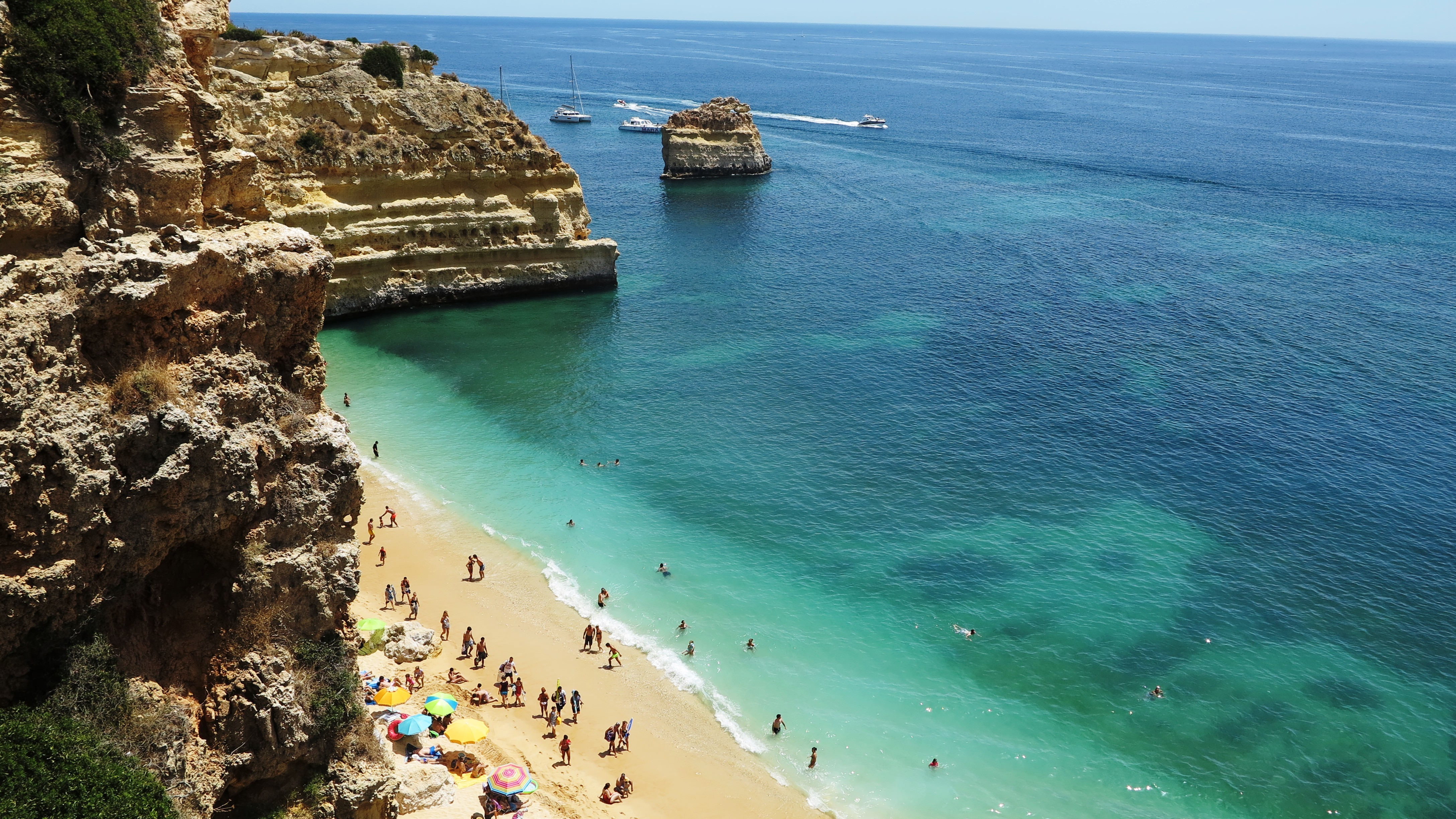 Une des plus belles plage du Portugal et peu-être d'Europe